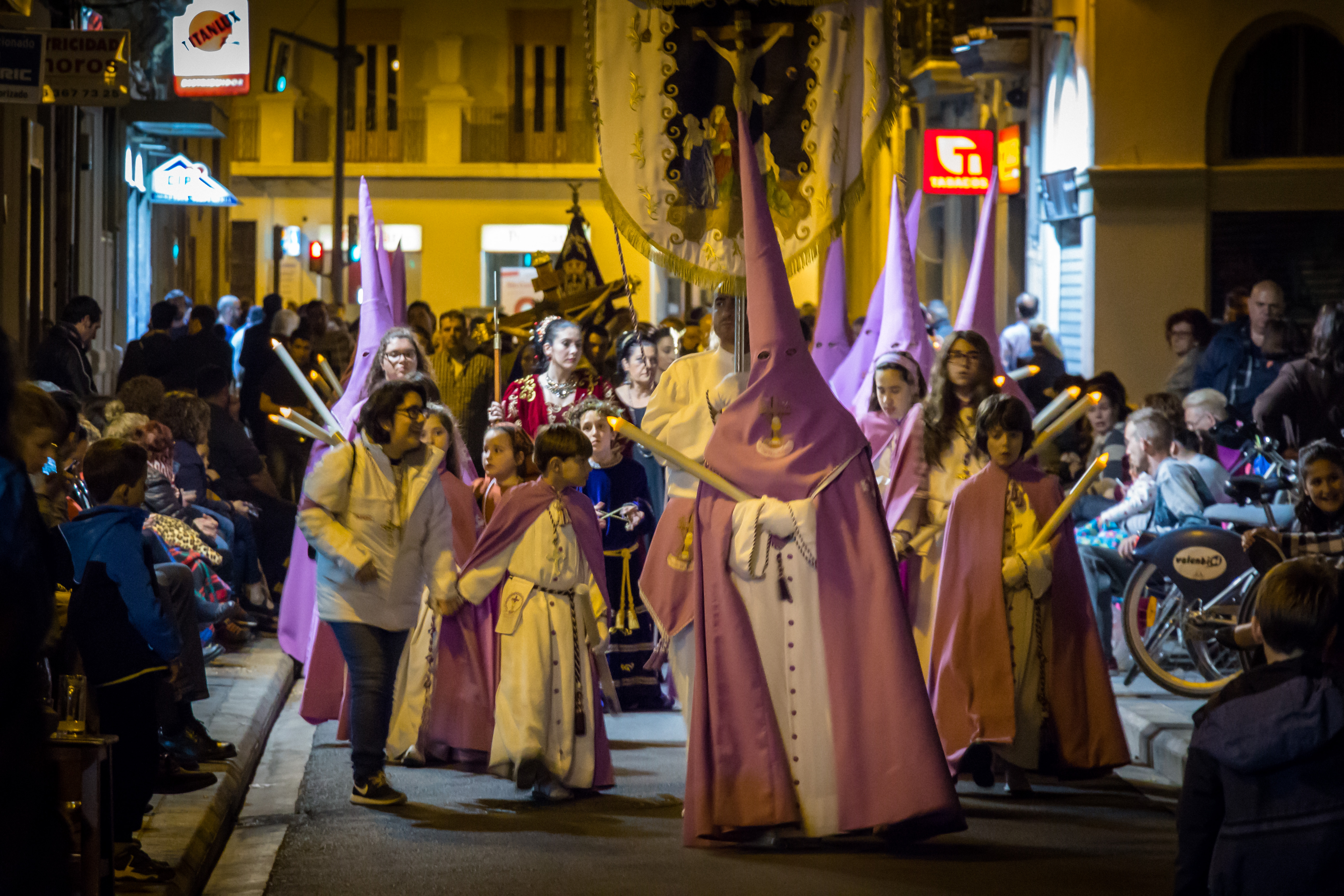 La Procesión del Santo Entierro de la Semana Santa Marinera tiene lugar la noche de Viernes Santo. La procesión transcurre por las calles del popular barrio marinero de El Cabanyal. This is a photography of a Folklore festival in Spain (Wikidata id Q9075846).